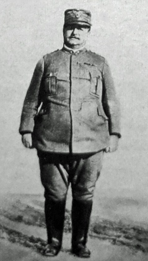 Paolo Morrone, ministre italien.